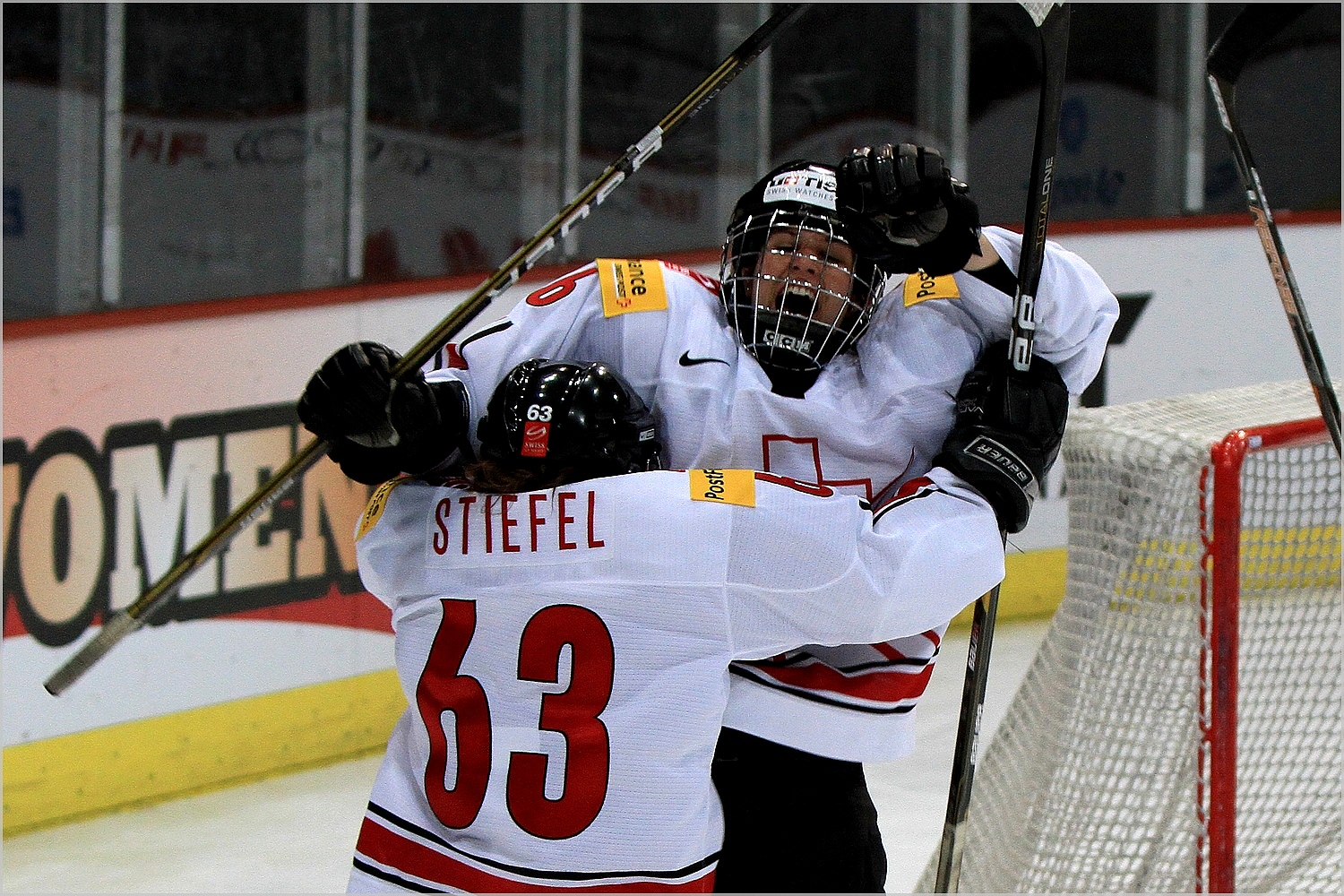 Anja Stiefel (#63, de dos) fête un but avec sa coéquipière en équipe de Suisse de hockey sur glace Julia Marty (#6, de face).